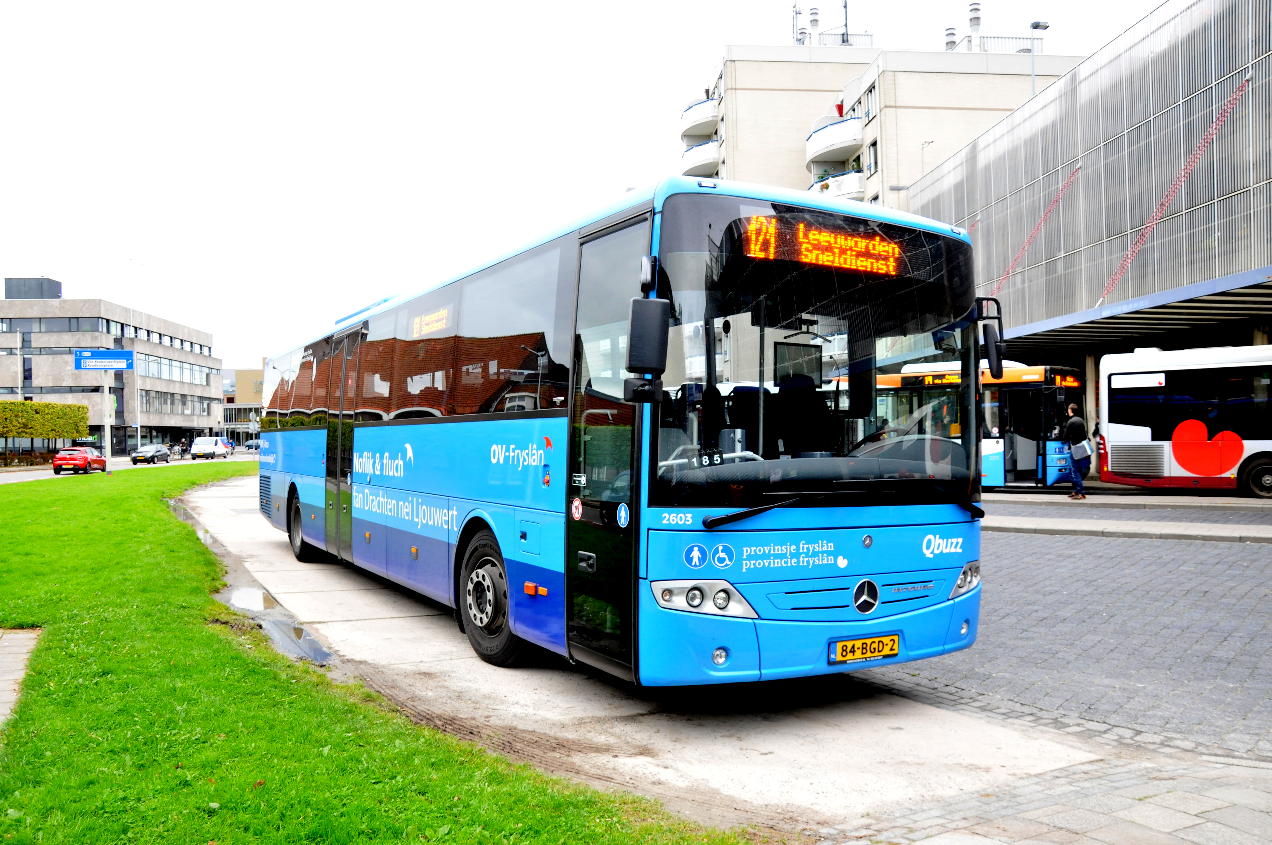 Qbuzz bus 2603 van het type Mercedes-Benz O633 Intouro L als lijn 121 naar Leeuwarden te Van Knobelsdorffplein Drachten. Sinds 11 december 2016 verder als Arriva bus 7543.